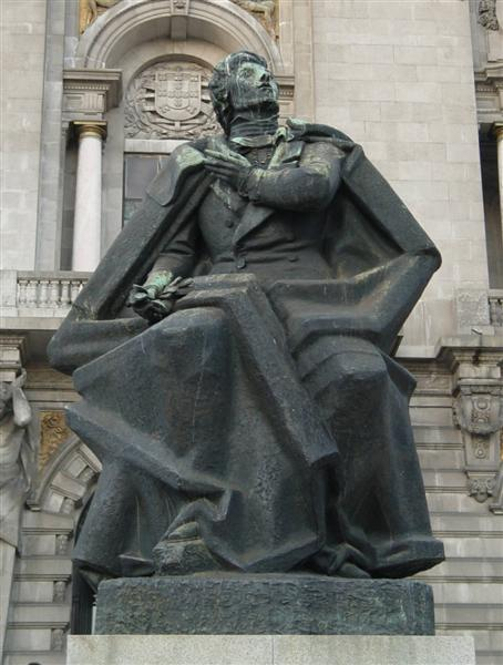 Monumento a Almeida Garrett do escultor Salvador Barata Feyo Avenida dos Aliados Porto Foto: José Gonçalves